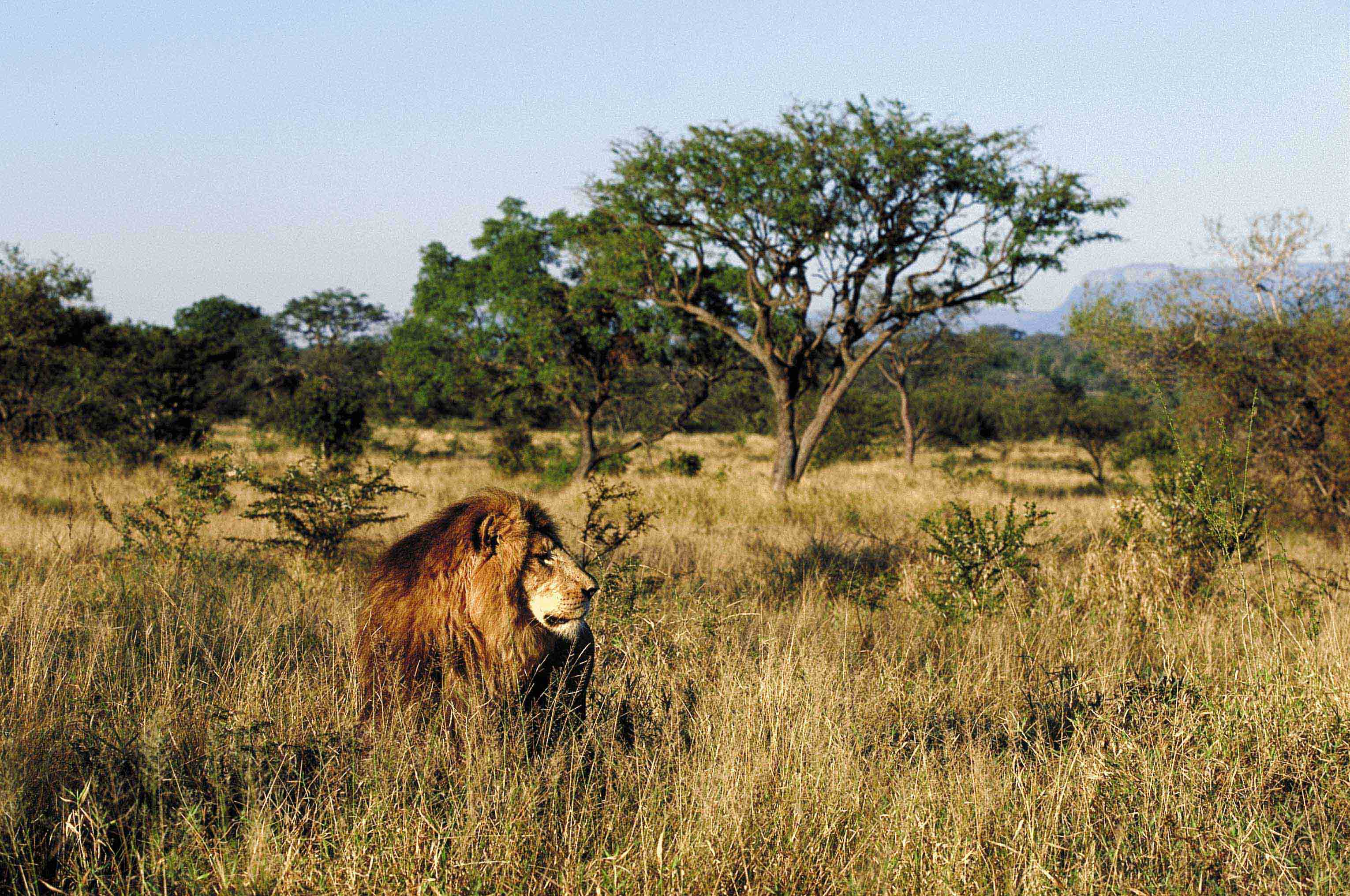 Vue du Limpopo en Afrique du Sud.